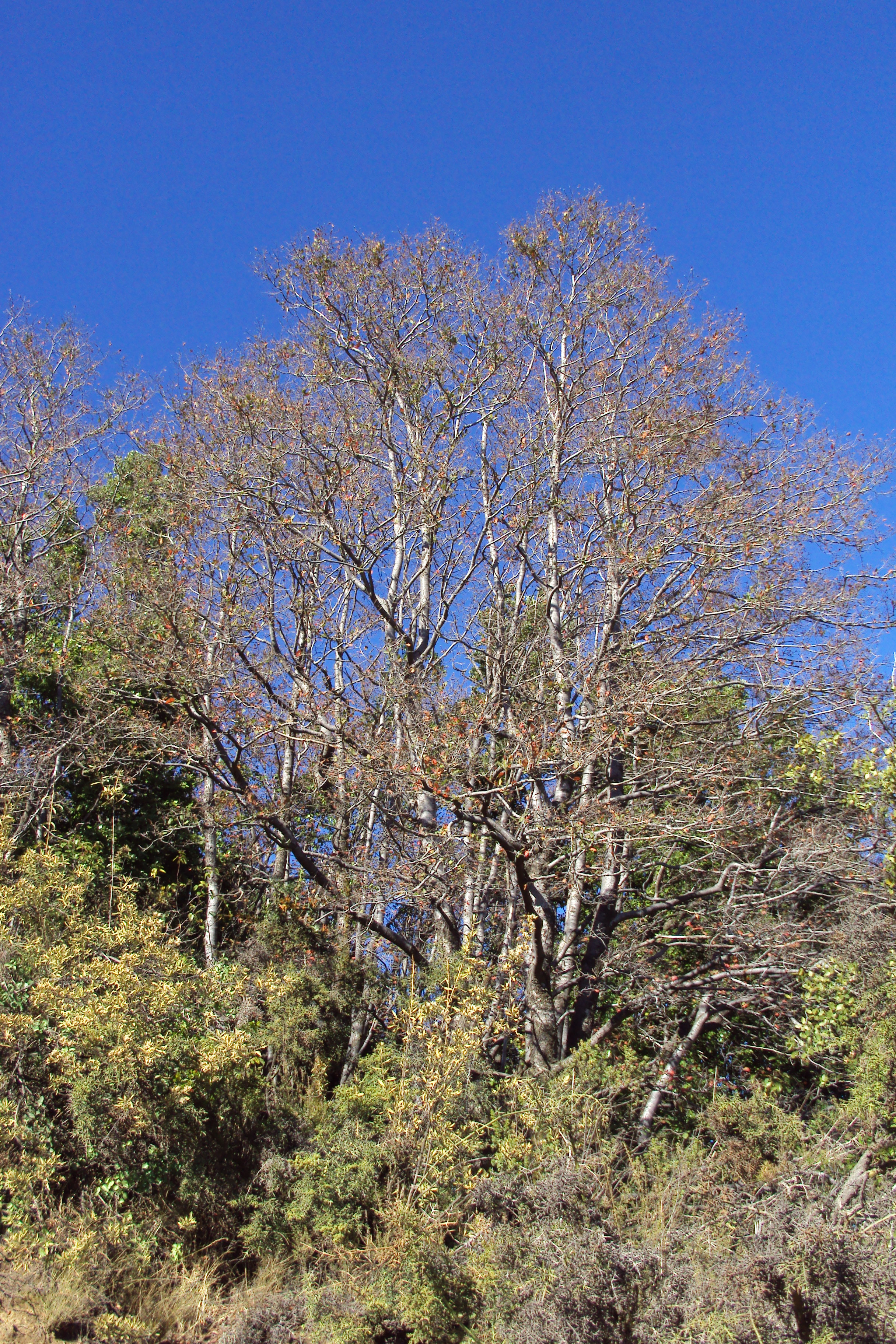 Nothofagus macrocarpa, Fagaceae, Arbol caduco.